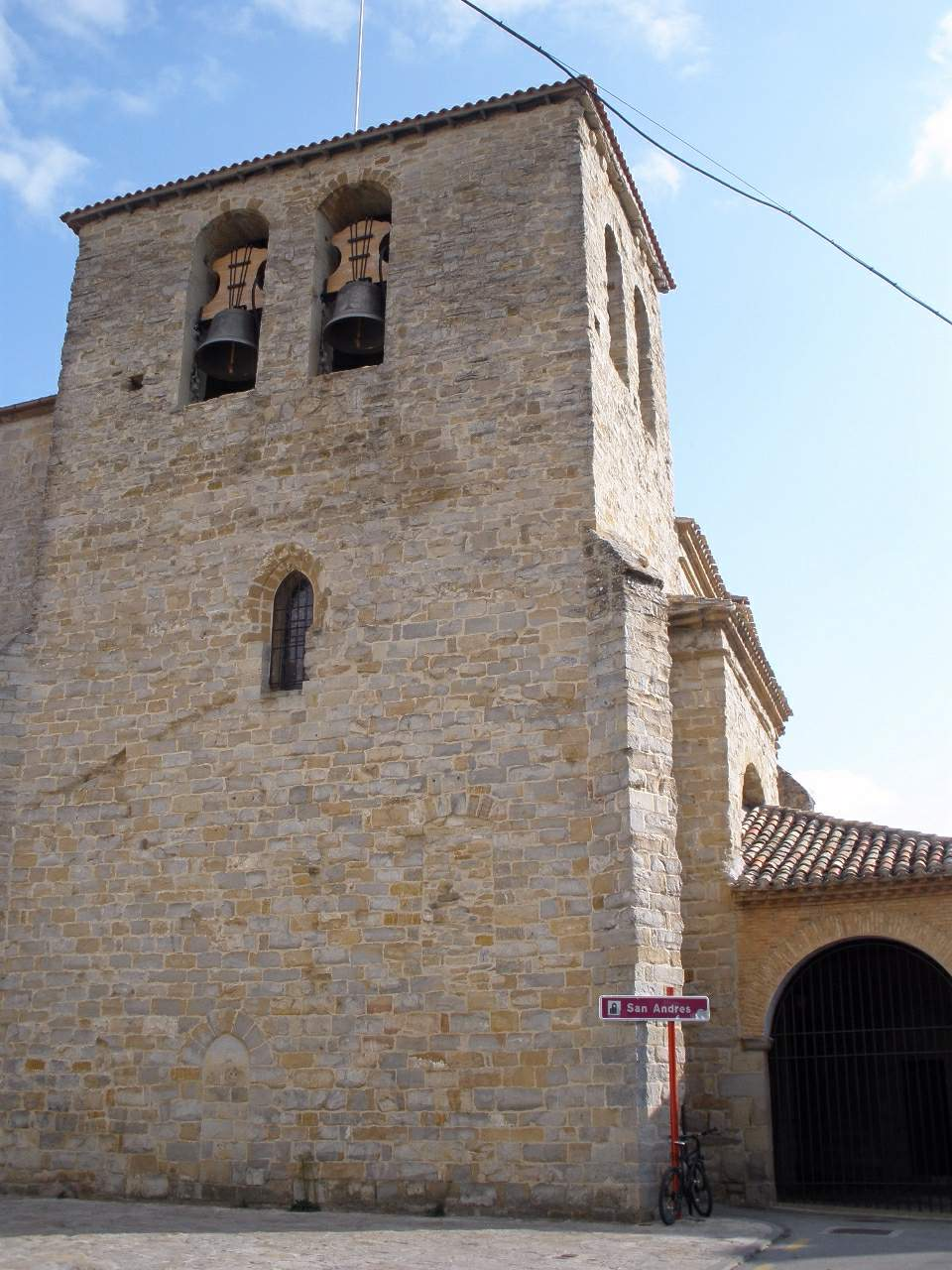 Zizur Mayor - Iglesia de San Andres